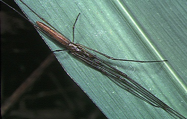 male Tetragnatha mandibulata from Okinawa.